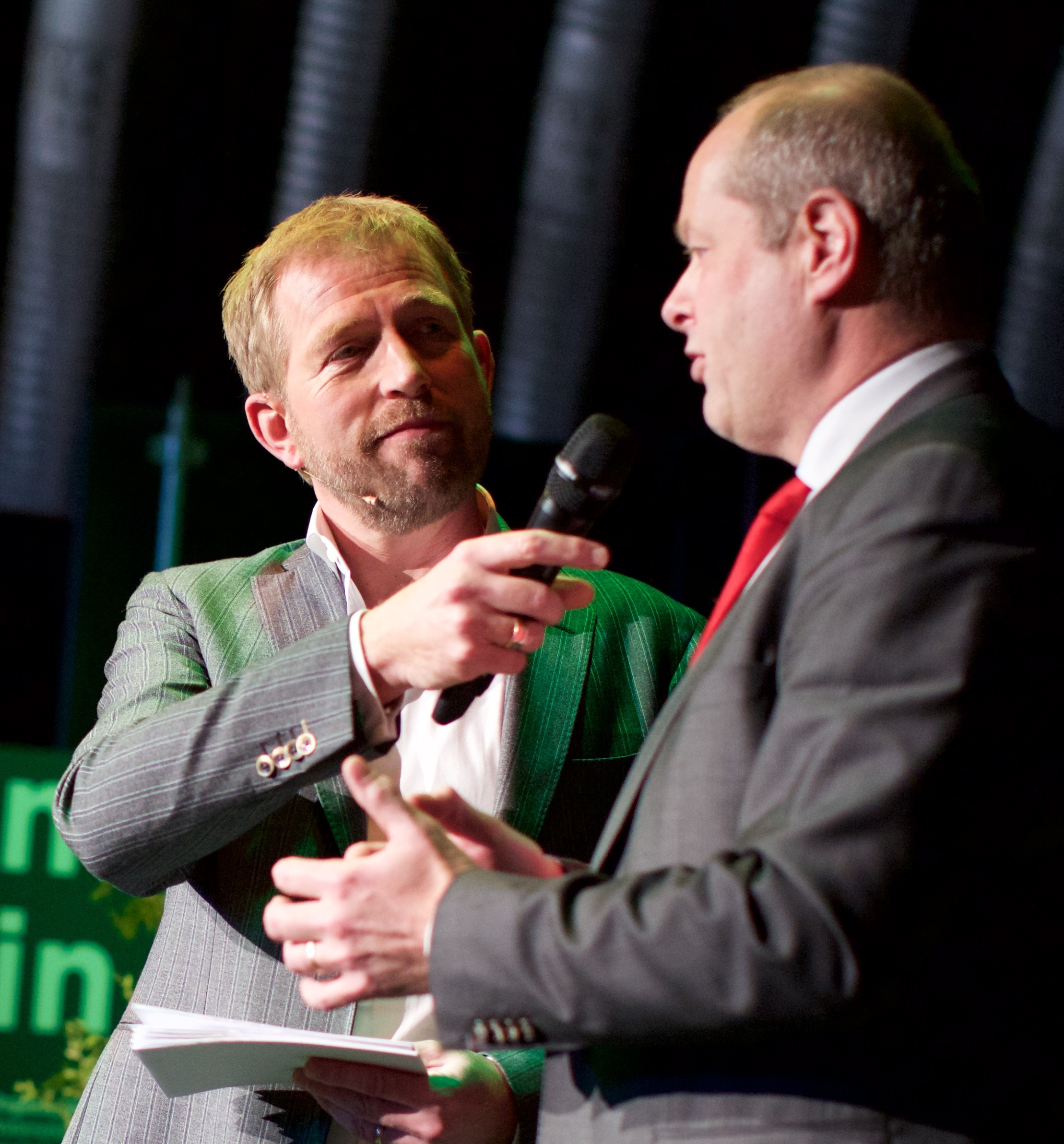 Op 5 februari 2015 vond de Natuurtop 2015 plaats, een bijeenkomst vol ‘inhoudelijke’ bedrijvigheid waar ervaringen en kennis werden uitgewisseld, inspiratie werd opgedaan en verbindingen werden gelegd tussen bestuurders en beleidsmedewerkers van Maatschappelijke (natuur) organisaties, bedrijfsleven, provincies en andere overheden. Dagvoorzitter Harm Edens (links) interviewt Gelders gedeputeerde Jan Jacob van Dijk